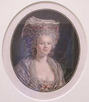 Portrait of Mademoiselle Rose Bertin (1747-1813)